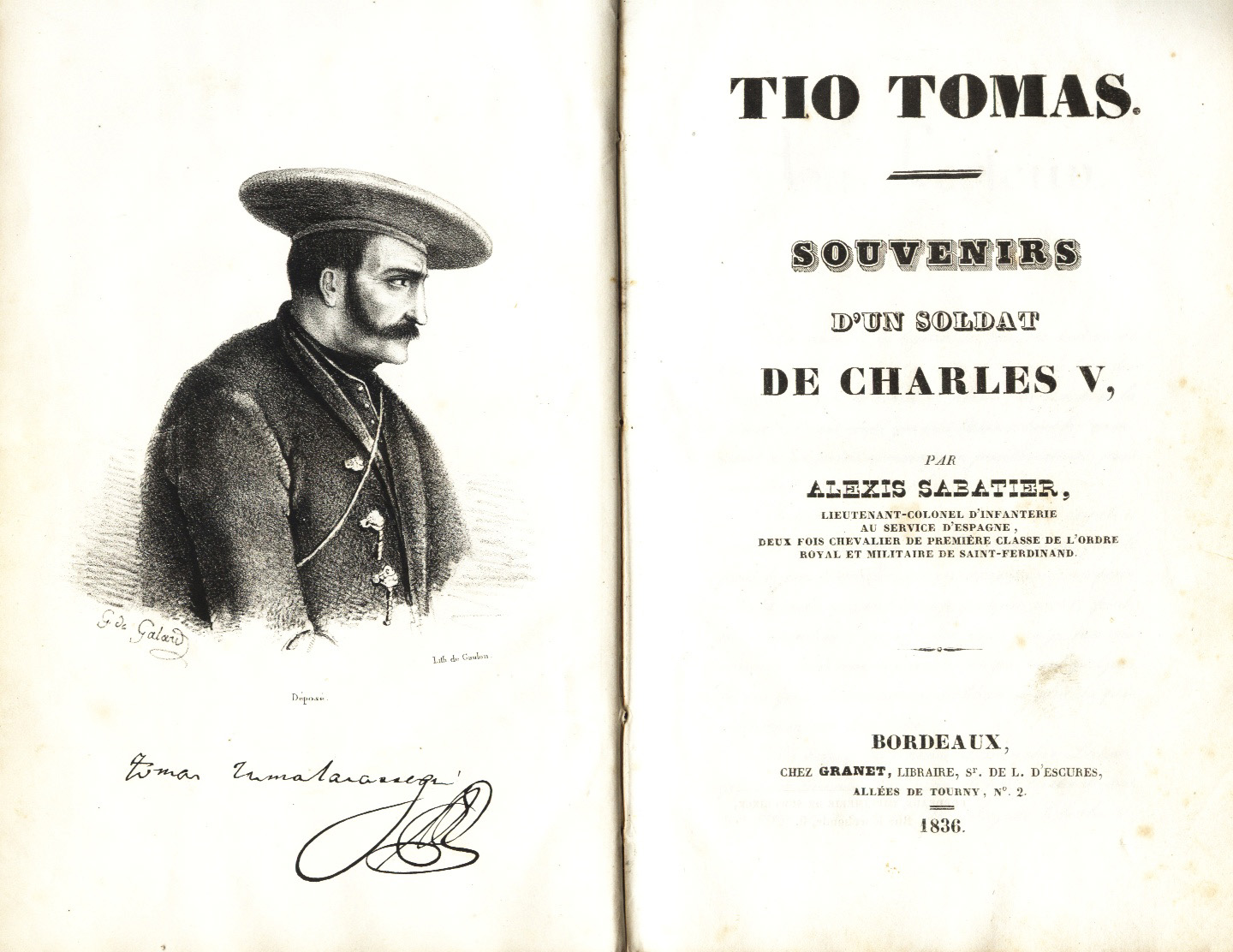 Portada. Alexis Sabatier. "Tío Tomás". Bordeaux 1836